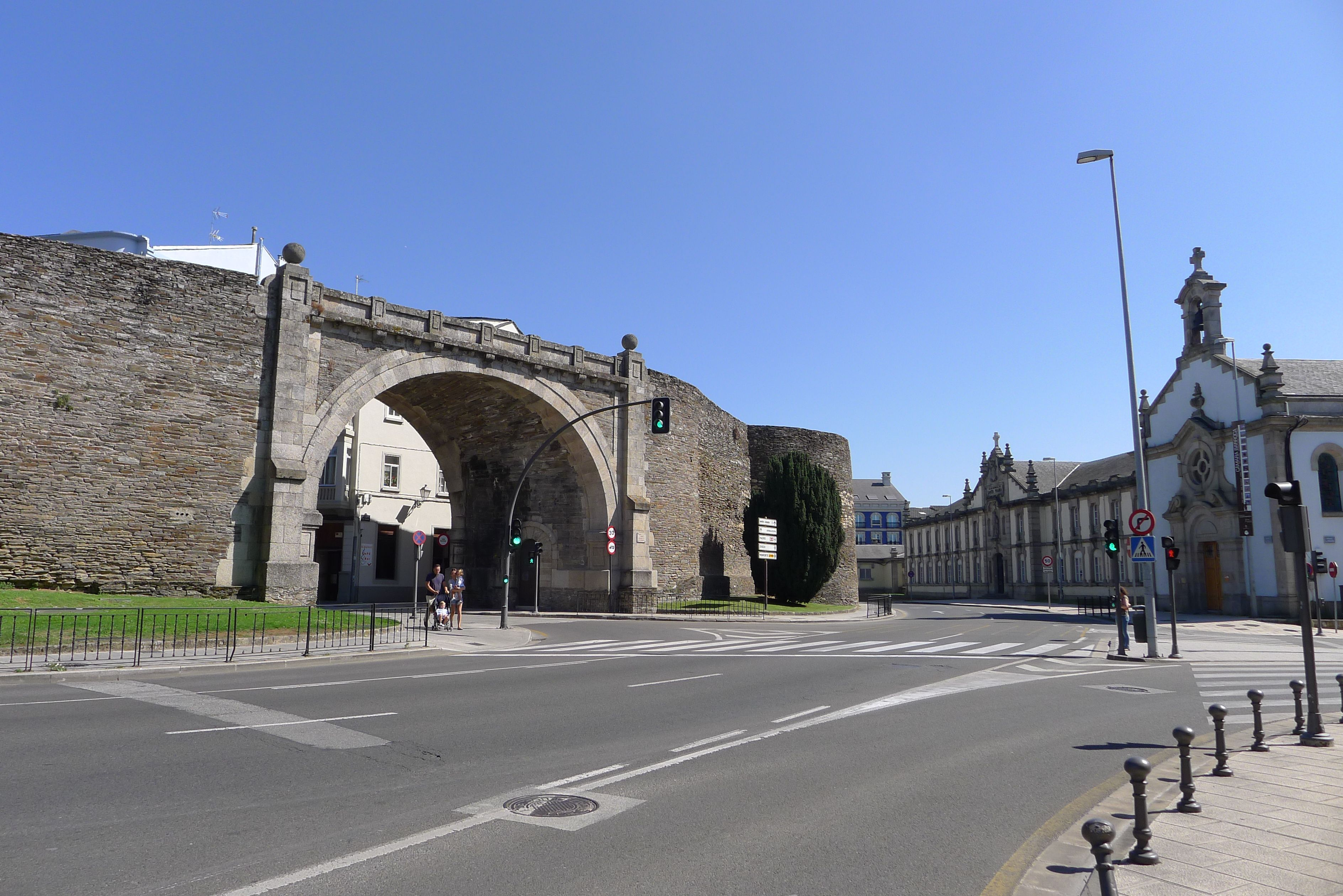 Muralla de Lugo - Galicia